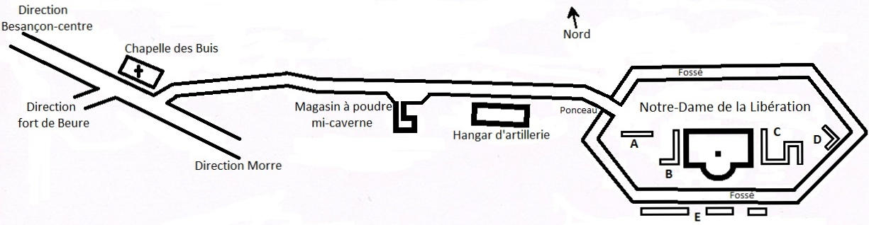 Plan de la place des Buis, à Besançon (Doubs, France).